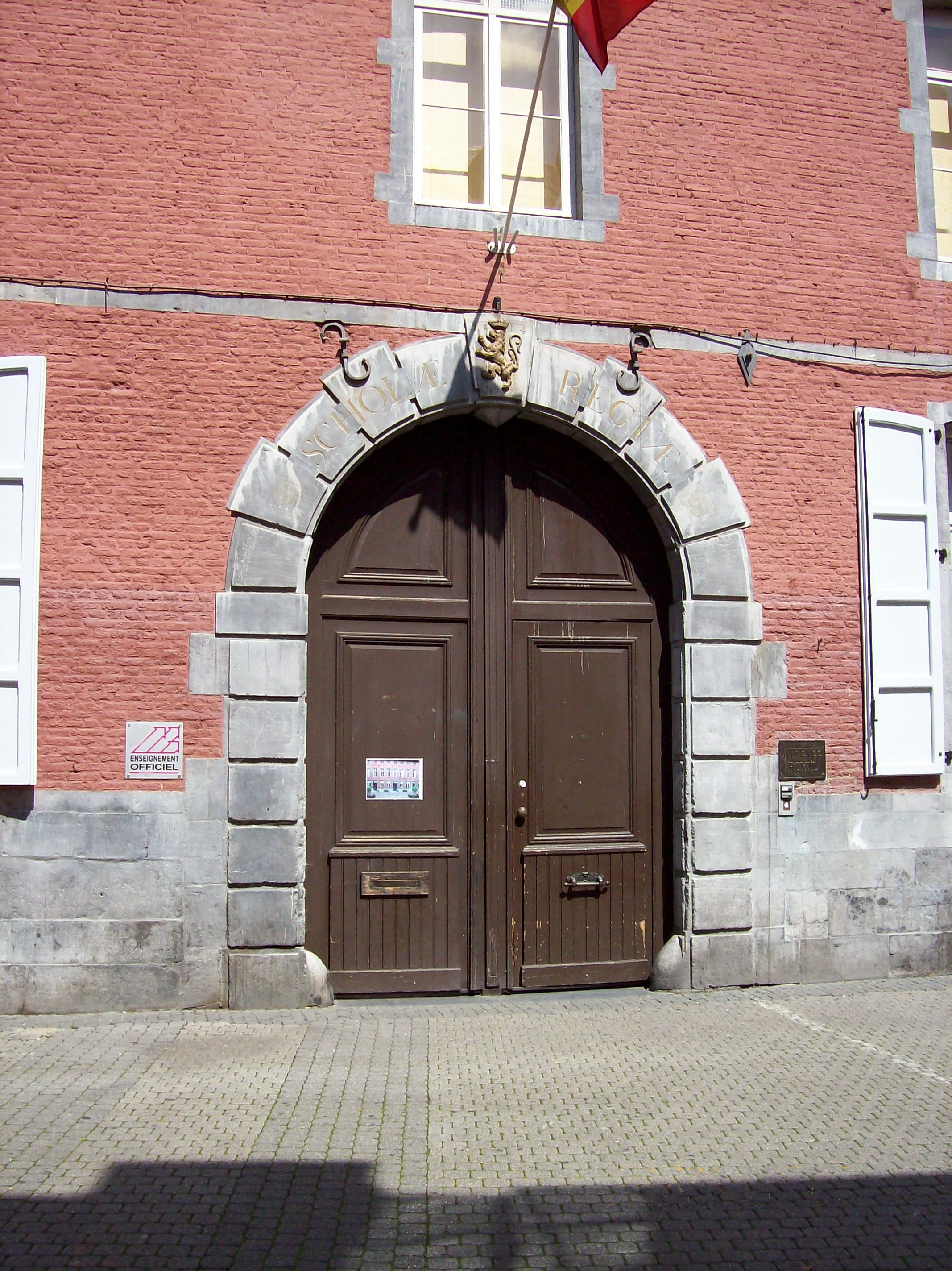 Portail (1614) de l'ancien collège jésuite de Namur (Belgique), aujourd'hui 'Athénée François Bovesse' (rue du collège, Namur).